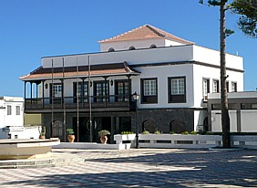 Ayuntamiento de Arico, en la provincia de Santa Cruz de Tenerife (España)